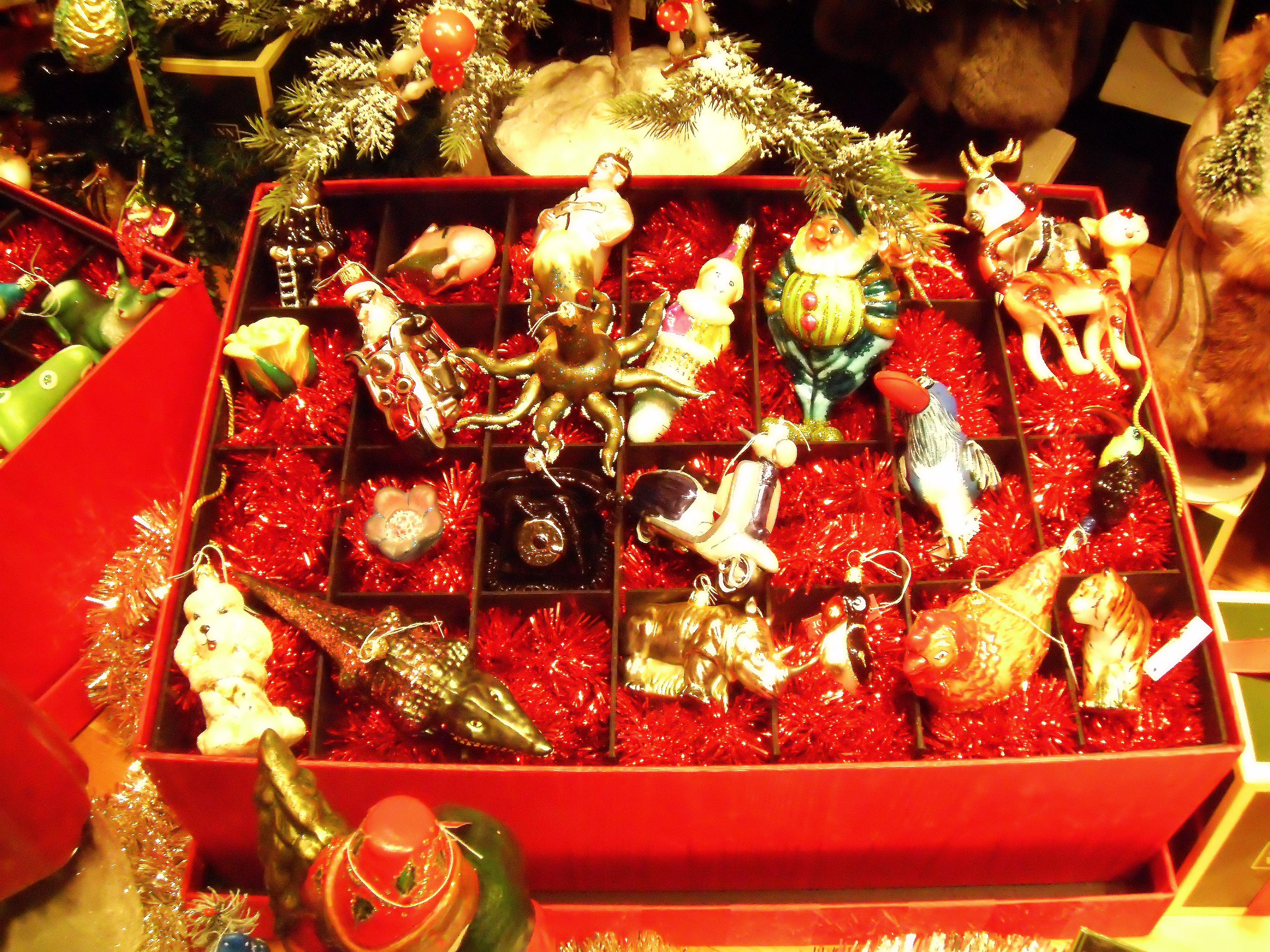 Außergewöhnlicher Weihnachtsbaumschmuck bei Johann Wanner in Basel.